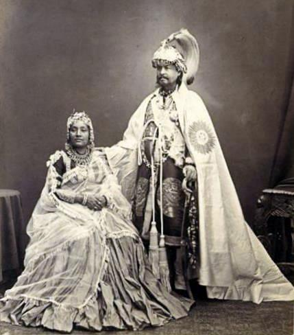 MAHARAJAH SIR RANADIP SINGH RANA BAHADUR, FIRST MINISTER OF NEPAL, AND HIS SECOND WIFE, 1860S